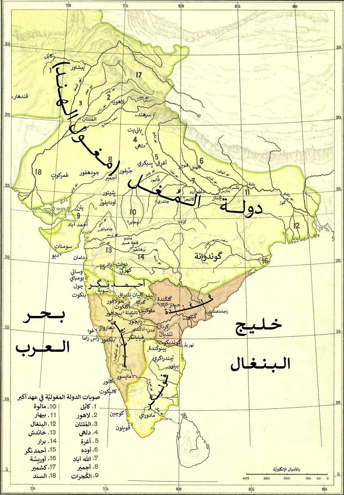 شبه القارَّة الهنديَّة وتقسيماتها الإداريَّة في عهد السُلطان جلال الدين أكبر.